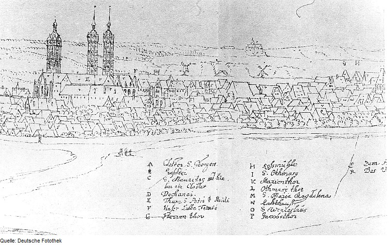 Original image description from the Deutsche FotothekNaumburg. Stadtansicht, aus: Wilhelm Dilichs Federzeichnungen kursächs. und meißn. Ortschaften, 1626-1629